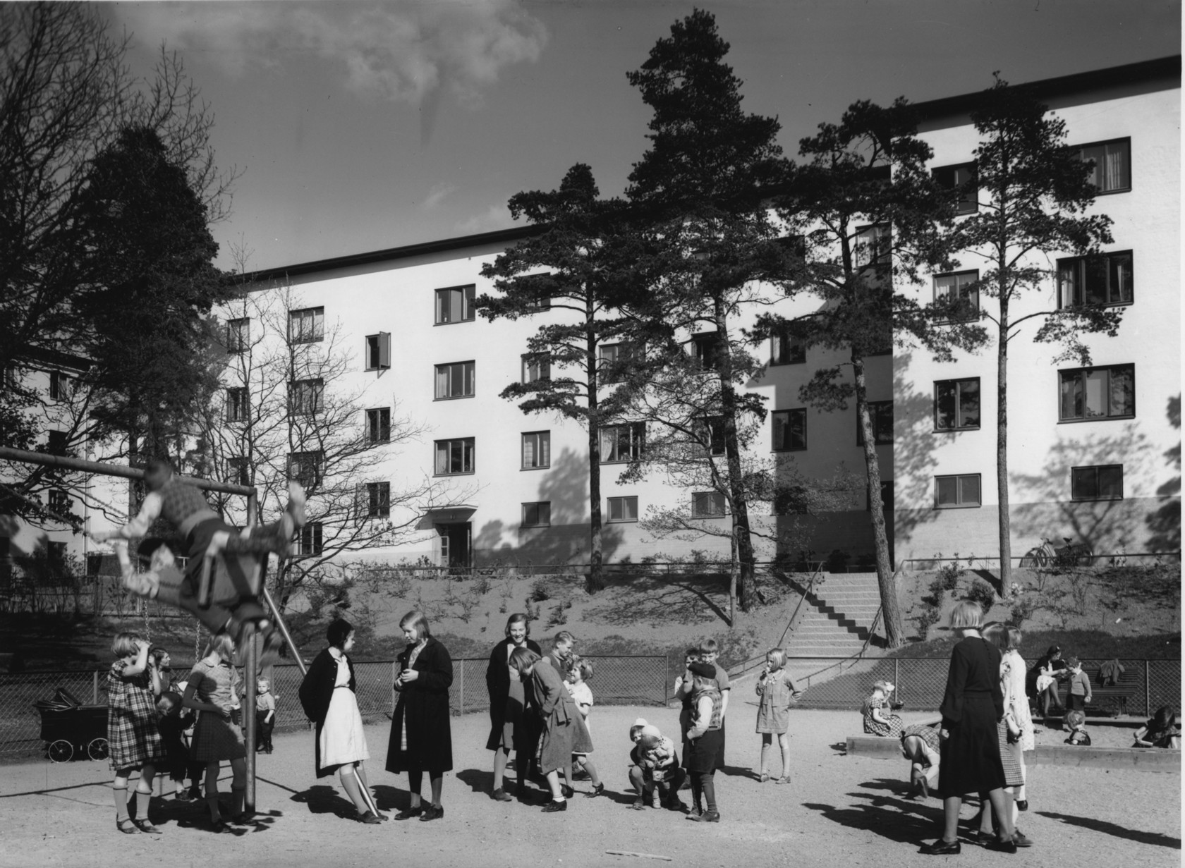 Bostadshus på Högklintsvägen i Traneberg, Stockholm, 1930-tal.